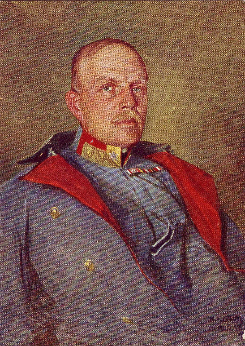 Es zeigt den späteren Feldmarschalleutnant Adolf von Boog.